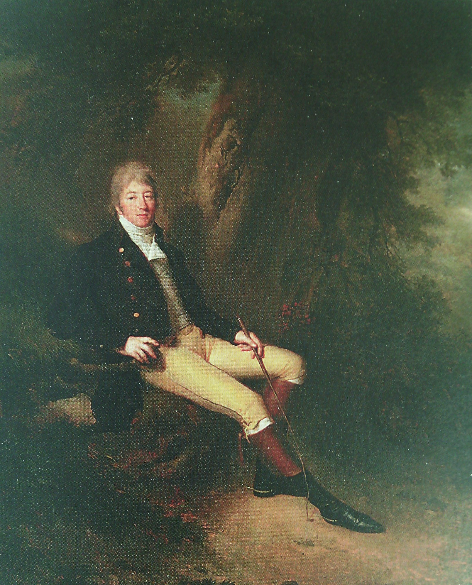 Граф Юрий Александрович Головкин